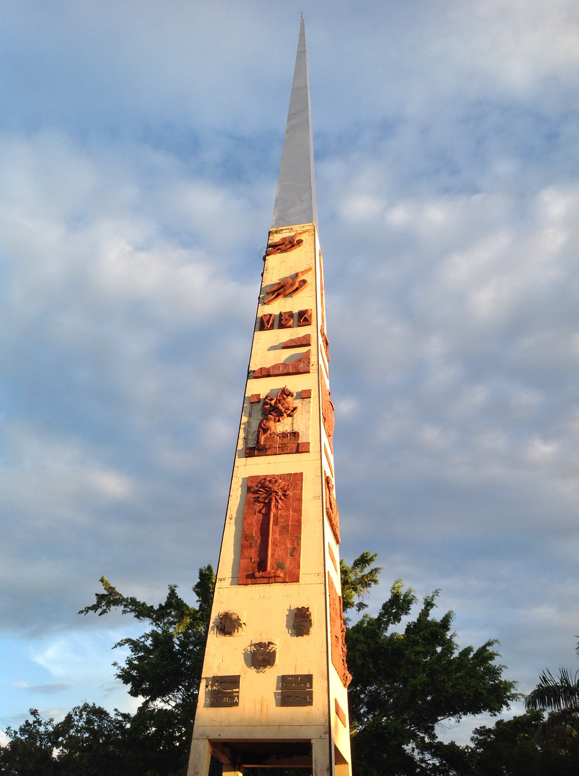 El Ombligo de Colombia queda ubicado en el Alto de Menegua del municipio de Puerto López, Meta